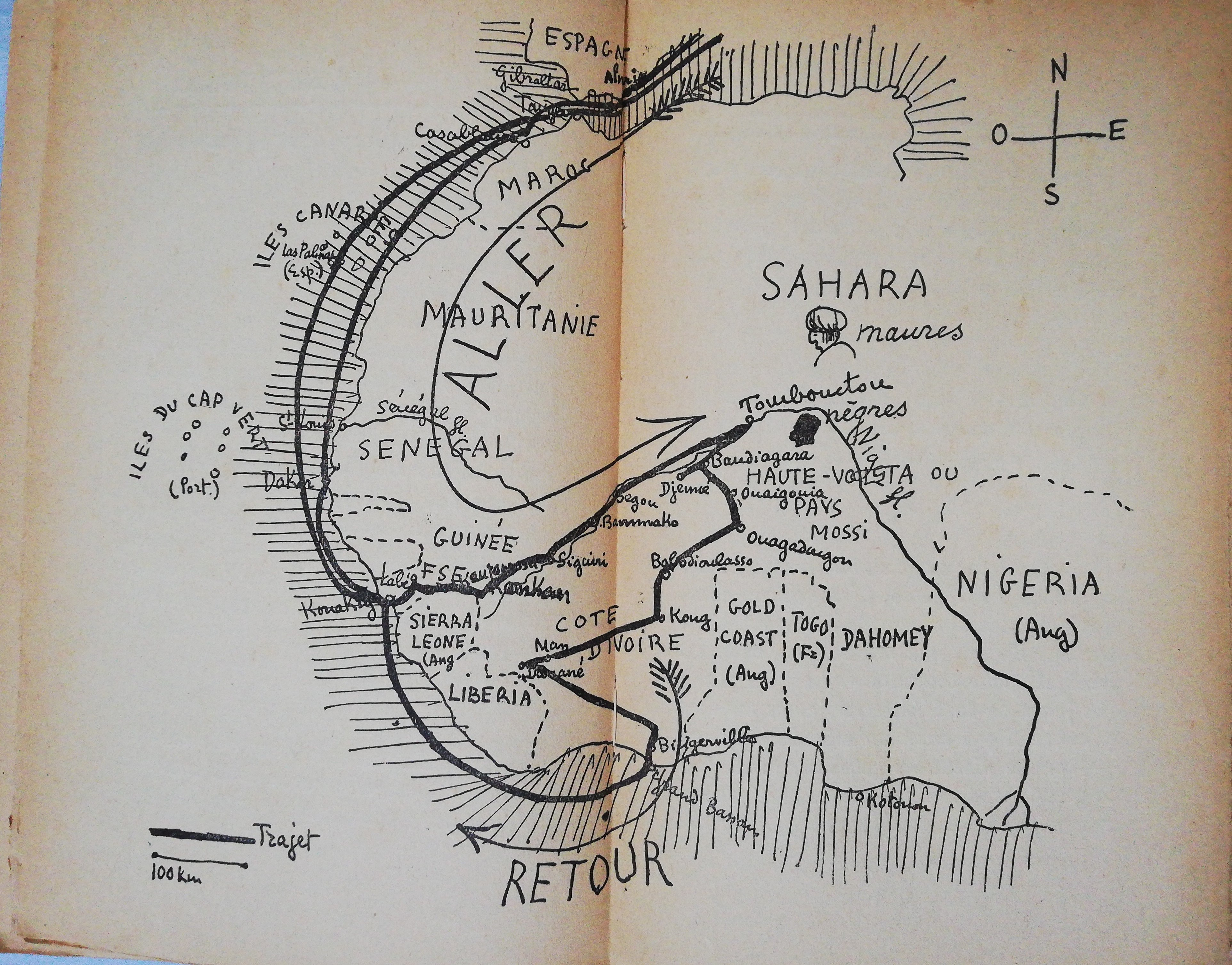 Carte du voyage de Paul Morand en Afrique Occidentale Française (A.O.F.), dans son livre « Paris-Tombouctou », éd. Flammarion, 1928.